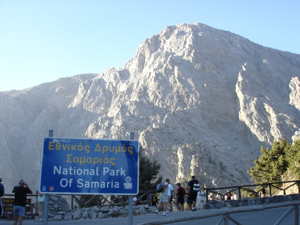 Samaria gorge entrance (Creta)